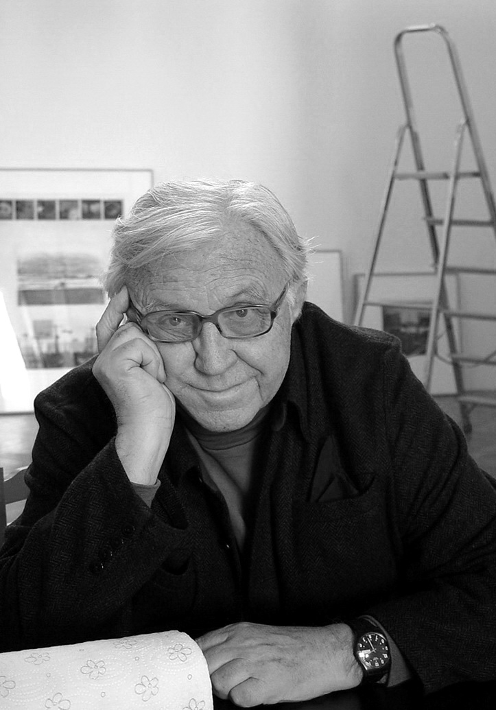 Pravoslav Sovák při instalaci své výstavy v Městské galerii ve Vysokém Mýtě 13. 5. 2010